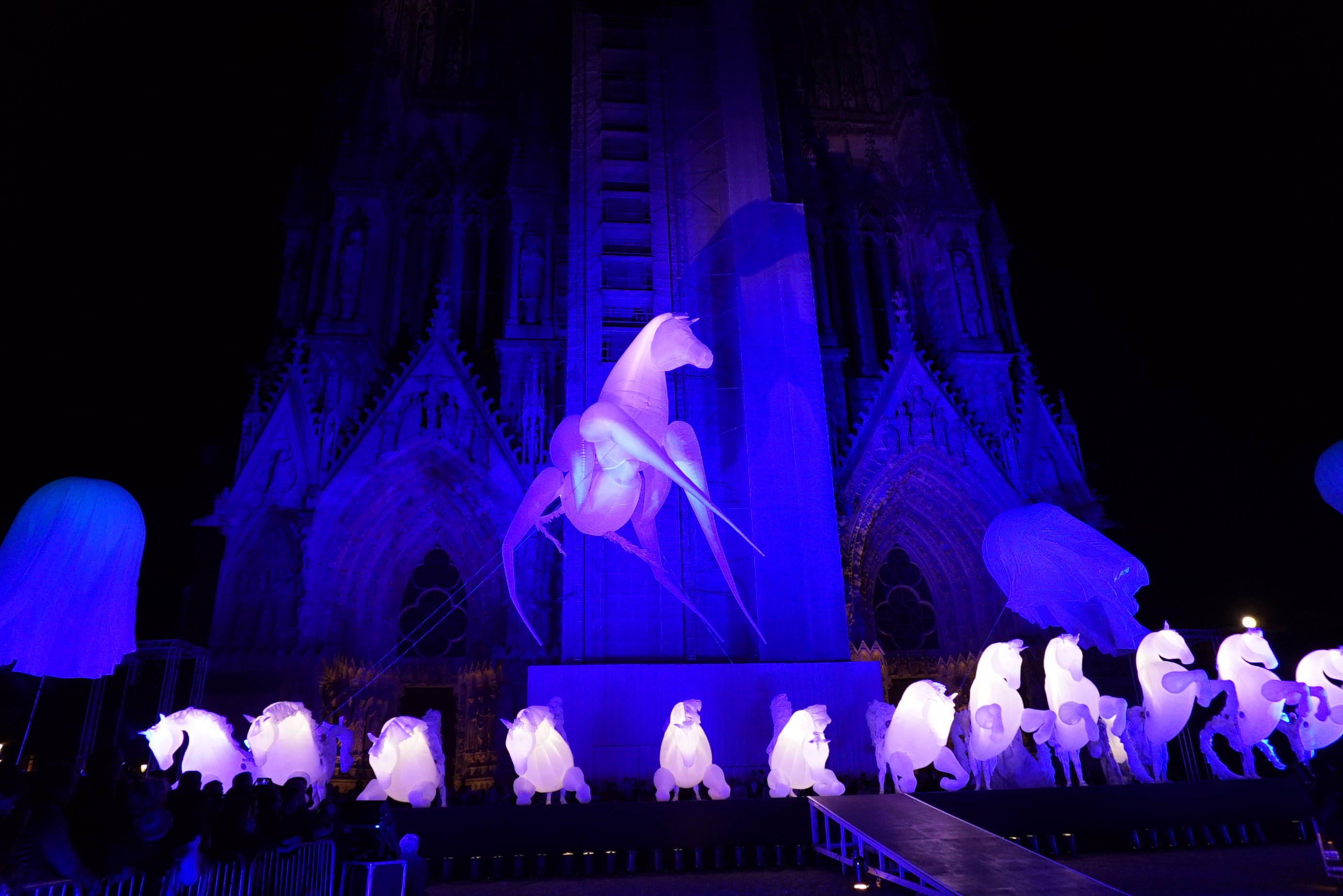 spectacle sur le parvis de la cathédrale.